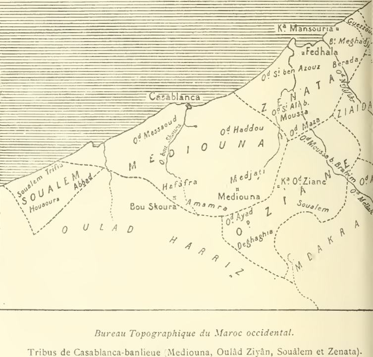 Carte représentant les territoires des différentes tribus de la Chaouia circa 1915